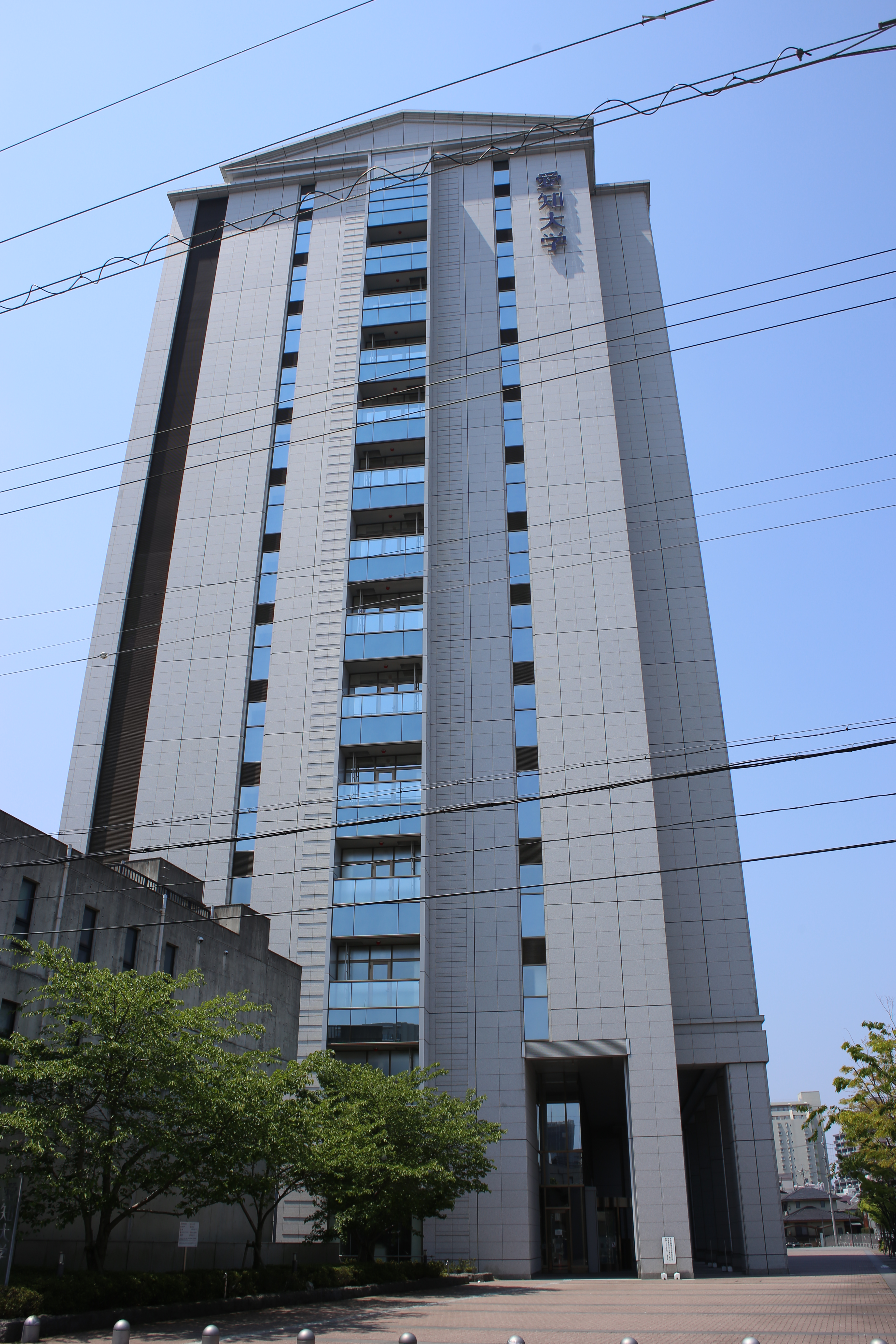 名古屋市東区筒井二丁目の愛知大学車道校舎を東側公道より撮影